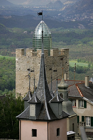 Herrschaftshäuser und Bischofsschlossturm